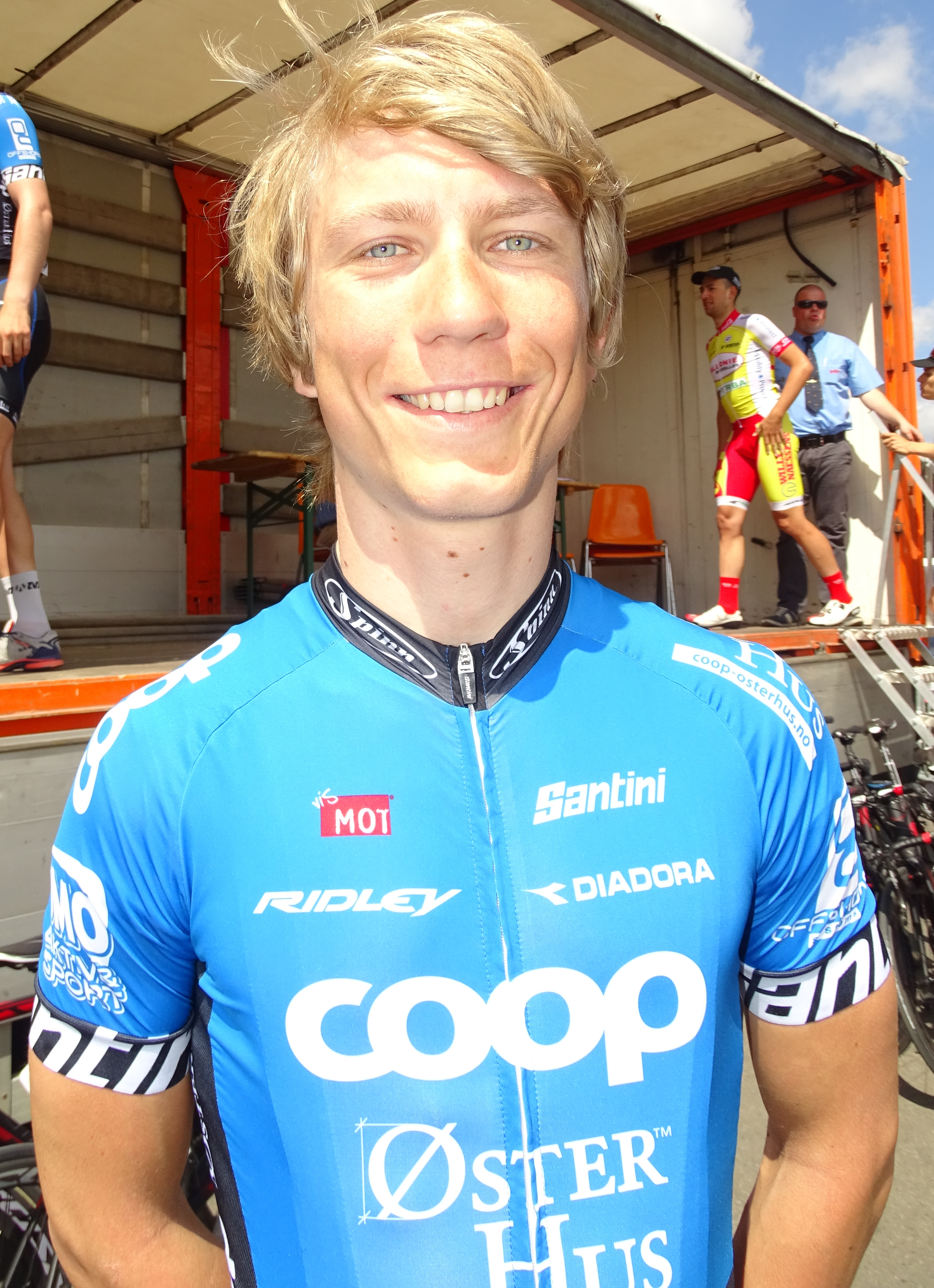 Reportage réalisé le dimanche 7 juin à l'occasion du départ du Mémorial Philippe Van Coningsloo 2015 à Wavre, Belgique.